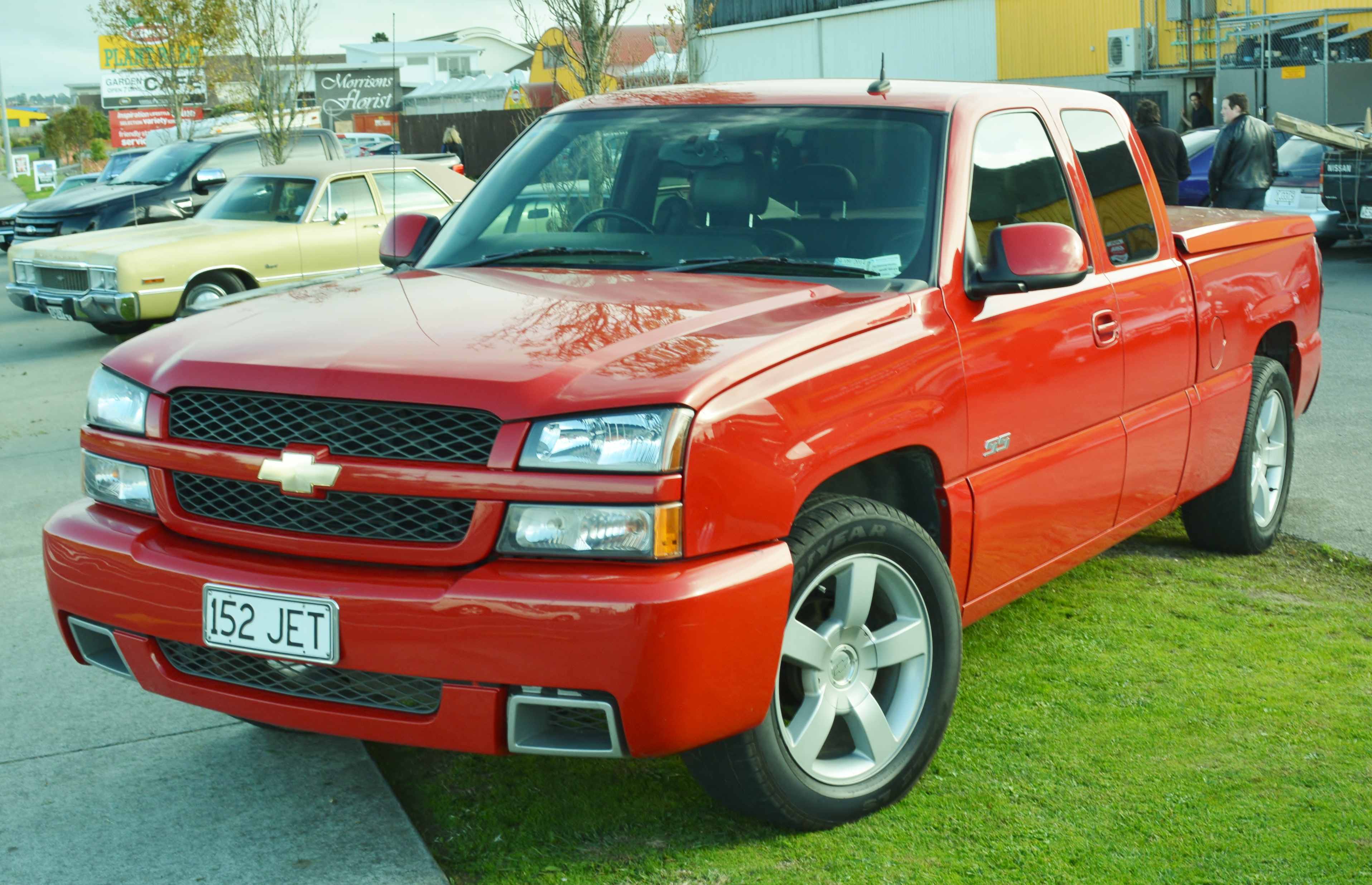 Henderson,West Auckland.New Zealand